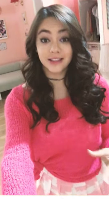 Ale Müller en una entrevista